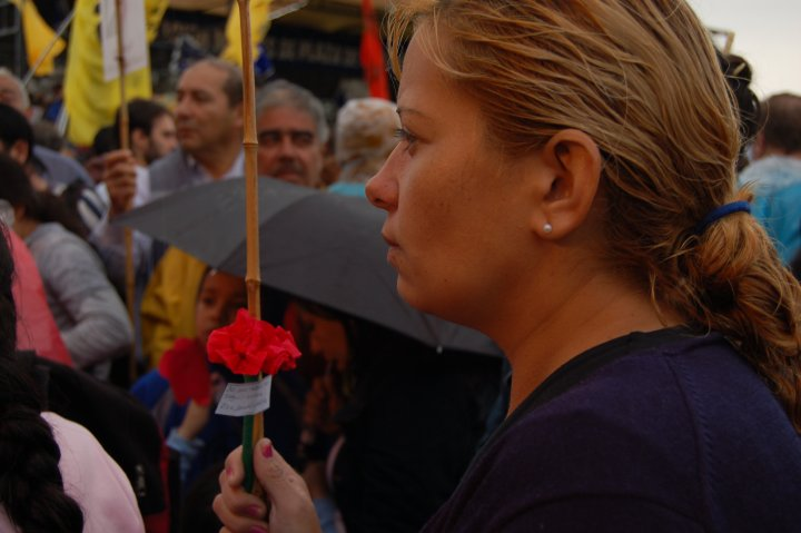 Acto de recuperación del terreno donde función el Centro Clandestino de Detención (CCD) de La Perla, Córdoba.